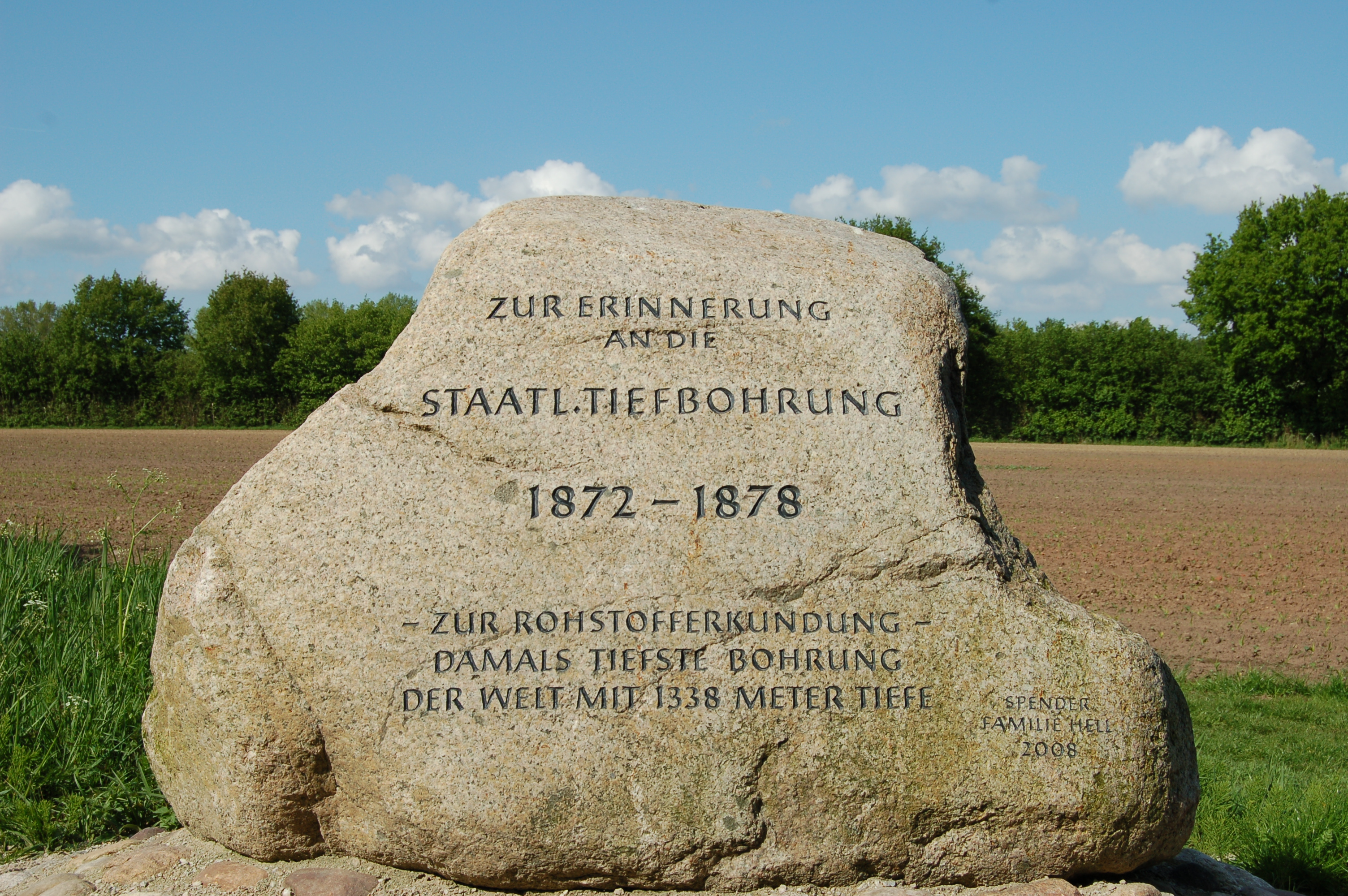 Gedenkstein an die tiefste Erdbohrung der Welt des 19.Jahrhunderts in Klein Nordende im Kreis Pinneberg, Schleswig-Holstein